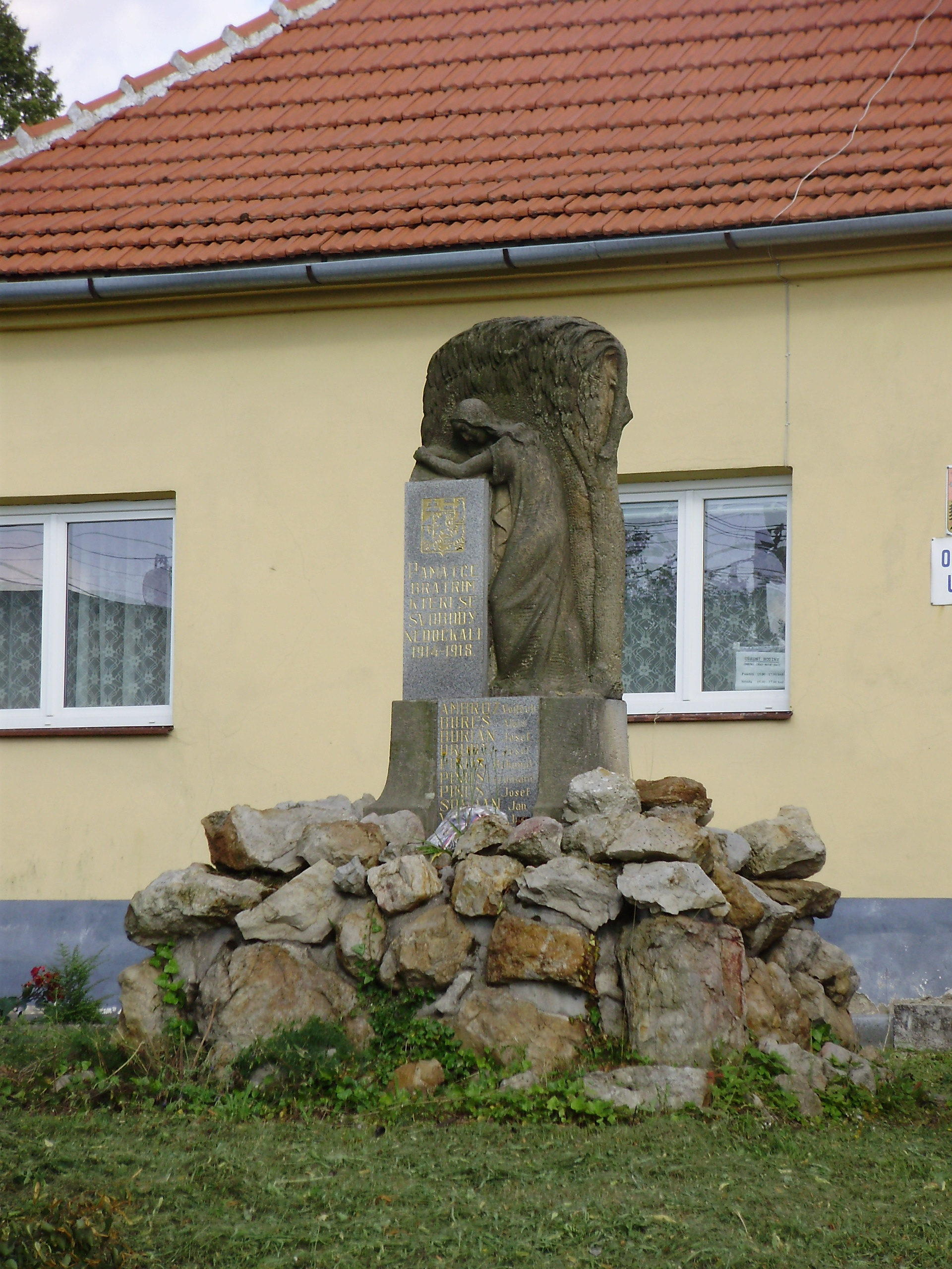 Pomník Nové Sady(Vyškov- Czech republic)